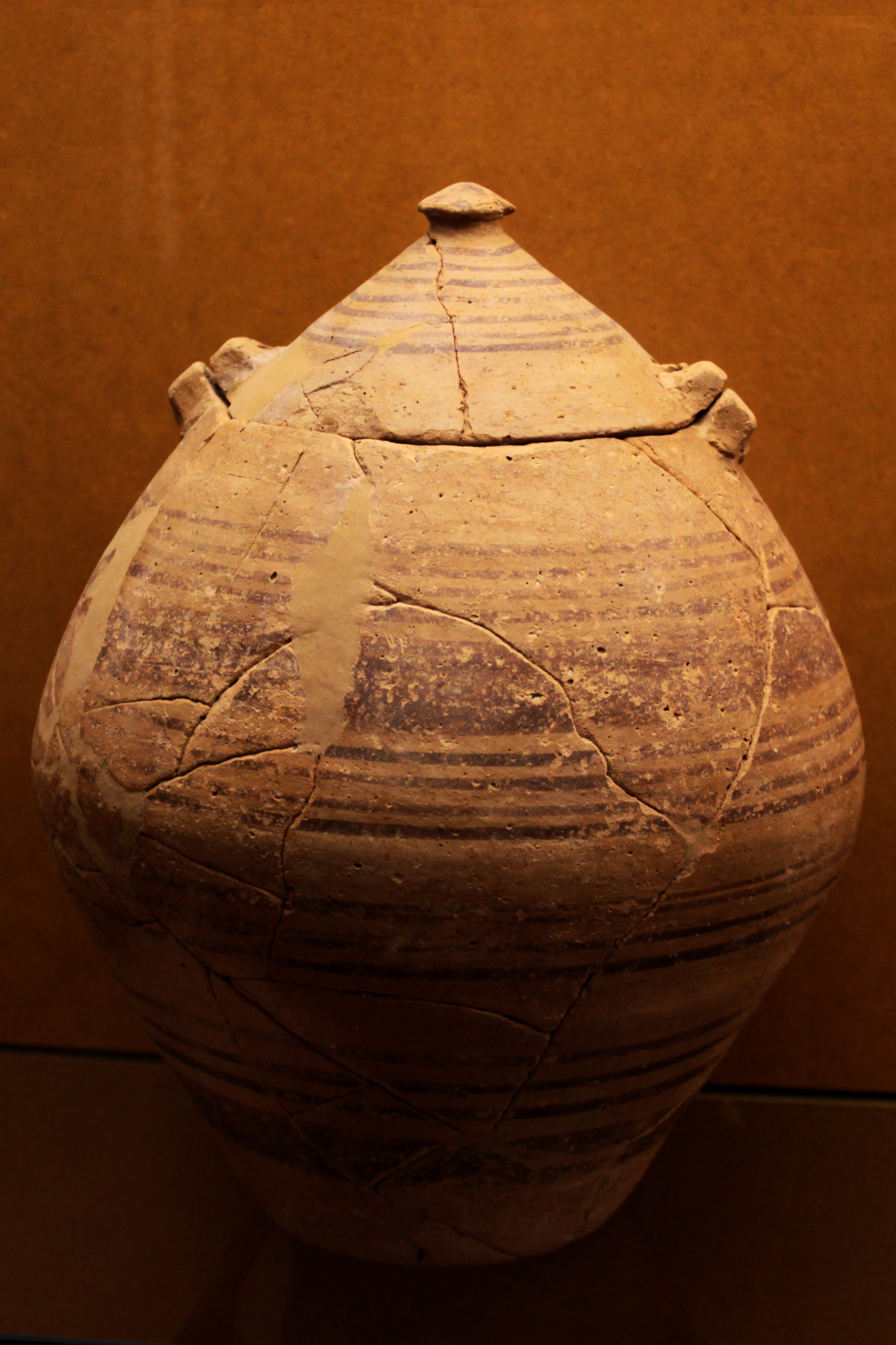 Urna cineraria del siglo VI aC perteneciente al yacimiento de La Solivella de Alcalá de Xivert. Depositada en el Mudeo de Prehistoria de Valencia, Comunidad valenciana, España.